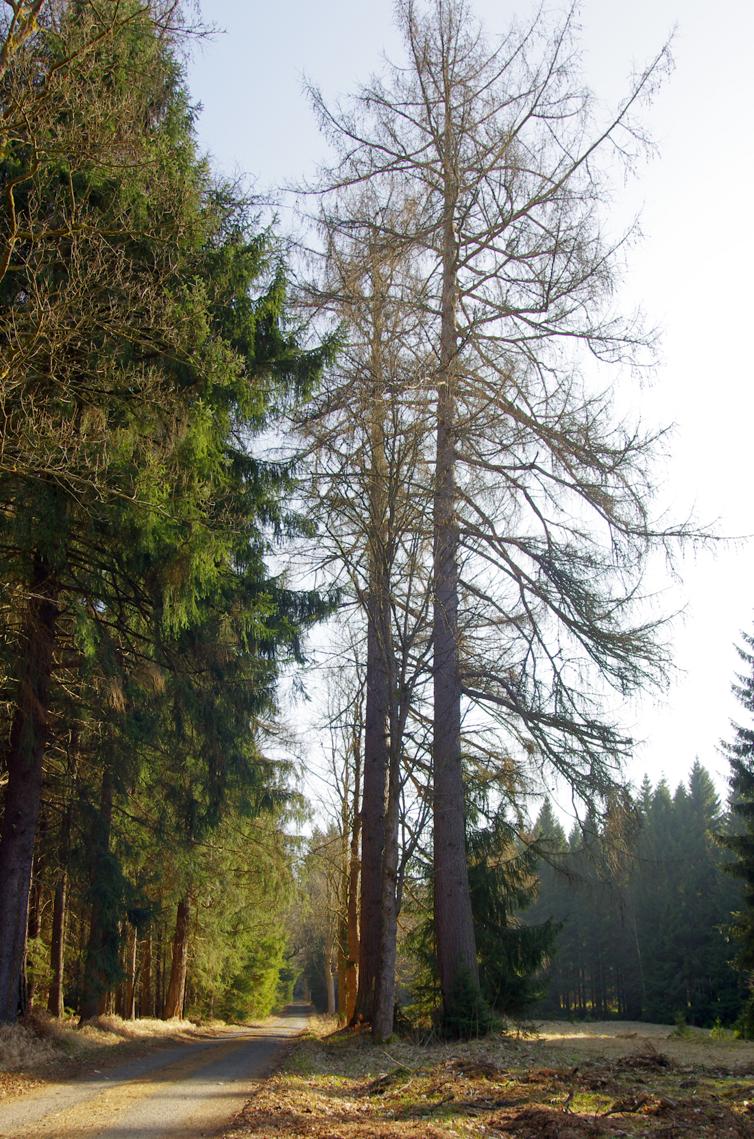 Šindelová, památné stromy - modřiny u Favoritu, Krušné hory